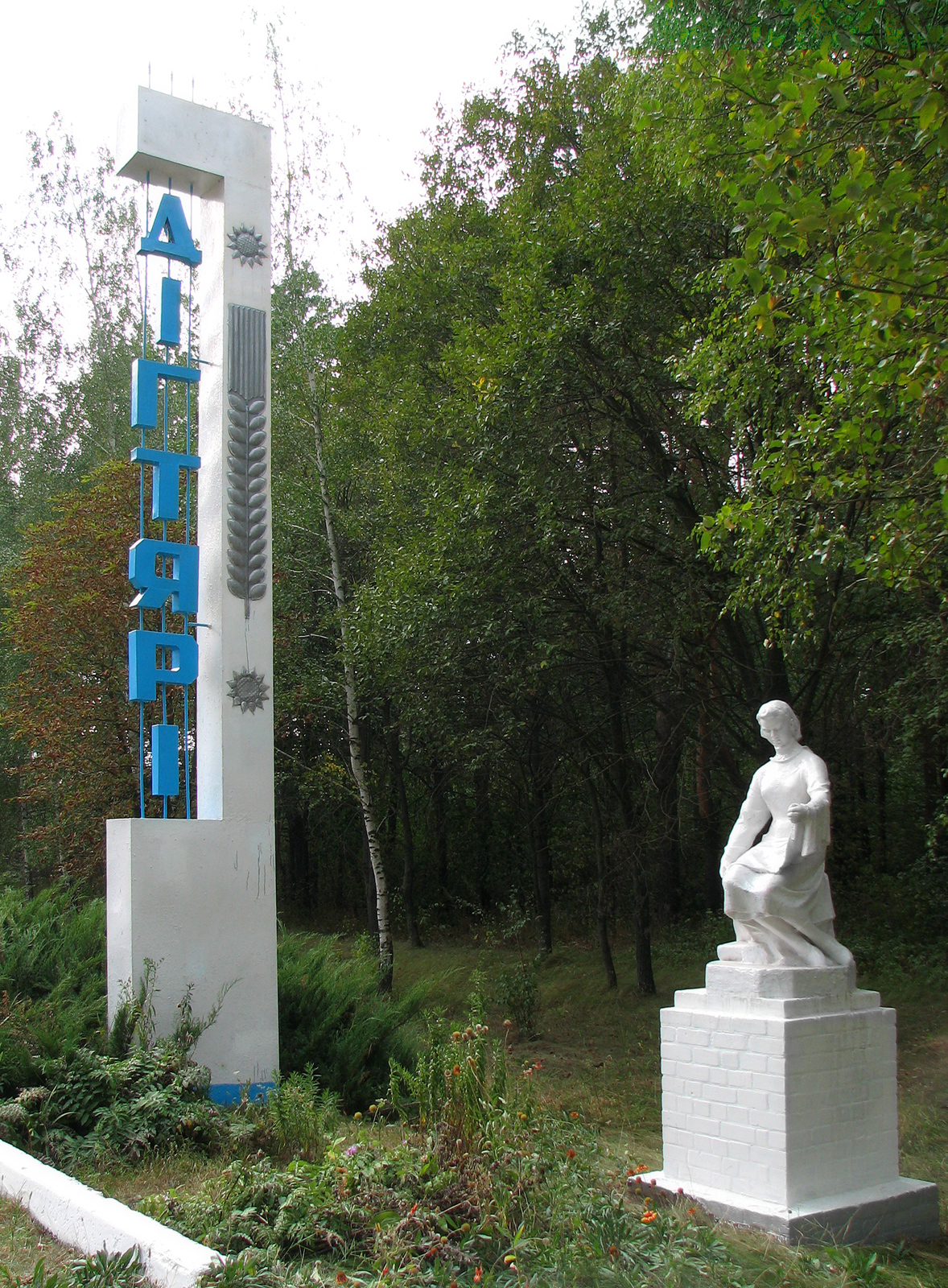 Дегтяри